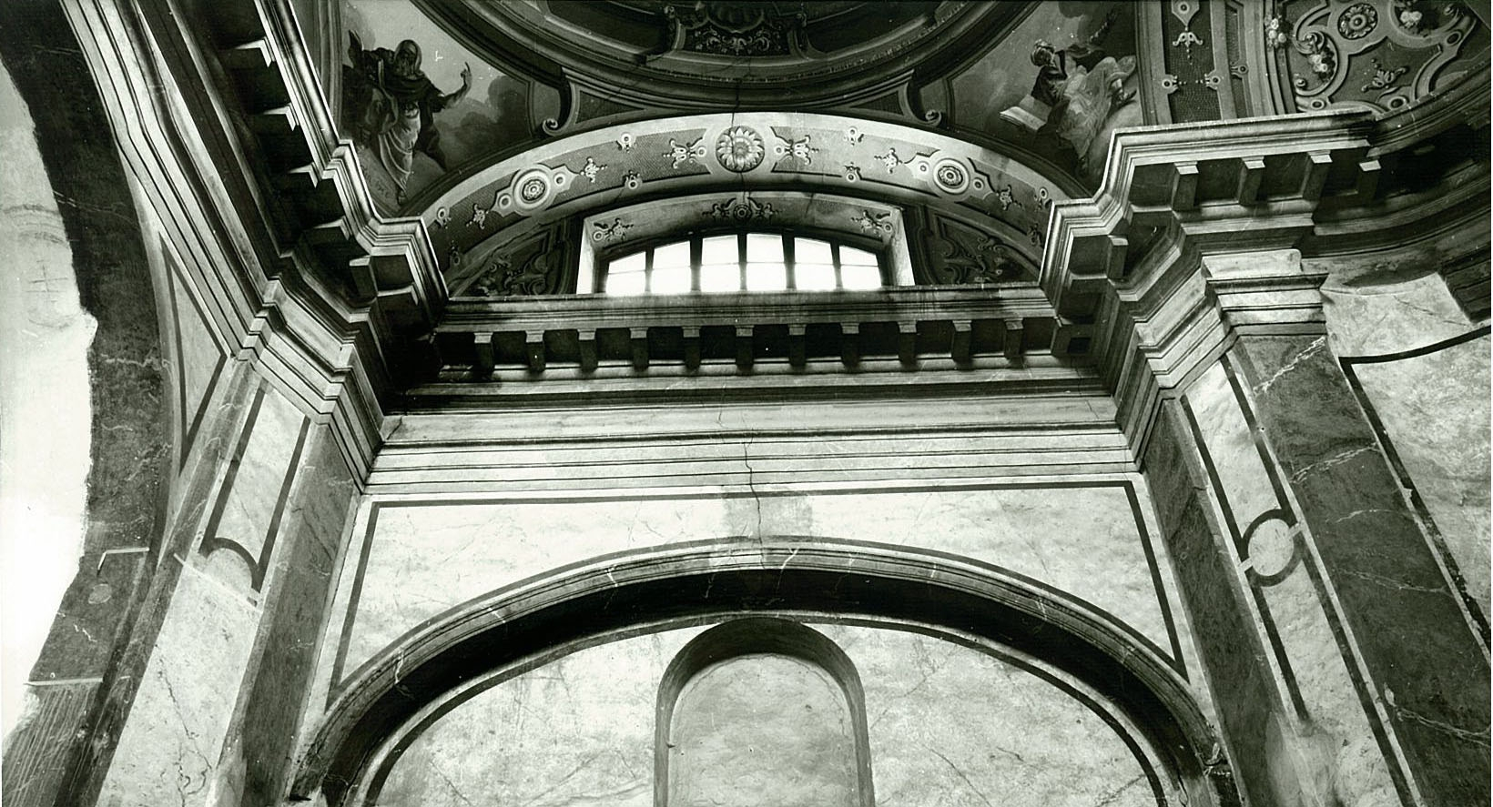 Und_Gesimse